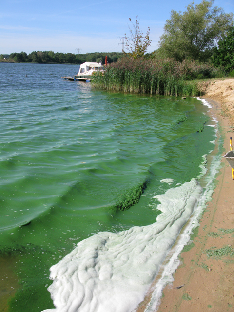 Algal bloom on Niegripper See